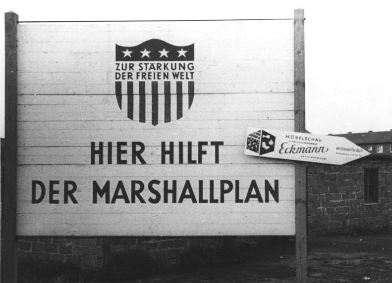 Recklinghausen, Marshallplan im Ruhrgebiet Zentralbild/T.T. 5.8.1953 [Herausgabedatum] In Recklinghausen, im grünen Herz des Ruhrgebietes, wurde die prahlerisch angekündigte Ausstellung "Wir bauen für Dich" eröffnet. Aber die Bevölkerung weiß, was sie von der Marschallplan-"Hilfe" zu halten hat. [Aufbauprogramm im Zuge des Marshall-Plans]